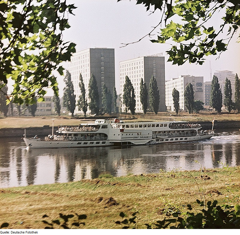 Original image description from the Deutsche FotothekDresden. Blick über die Elbe zur Wohnbebauung Terrassenufer Steinstraße